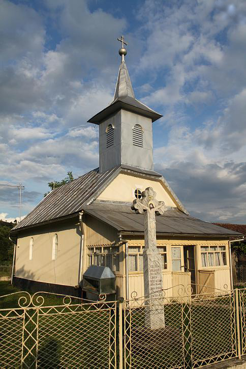 Völcs (románul: Elciu) 18. századi fatemplomát eladták Csurenypusztának (Szilágy megye), ahol 1928-ban állították fel újra (wikipedia).